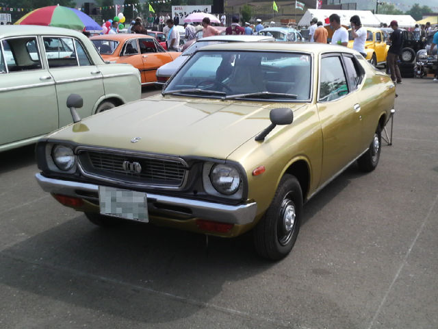 チェリーF-2クーペ